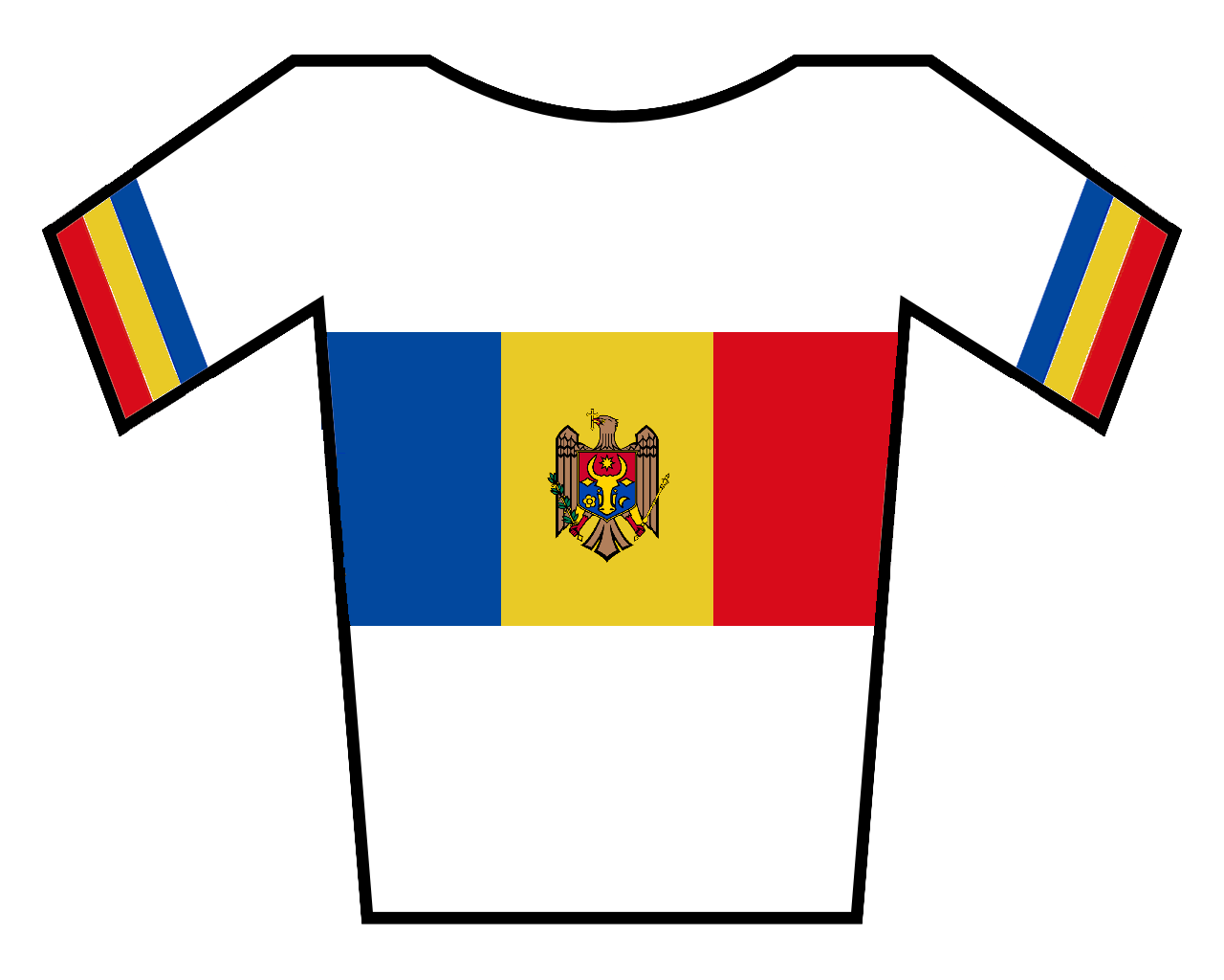 Maillot de Moldavia